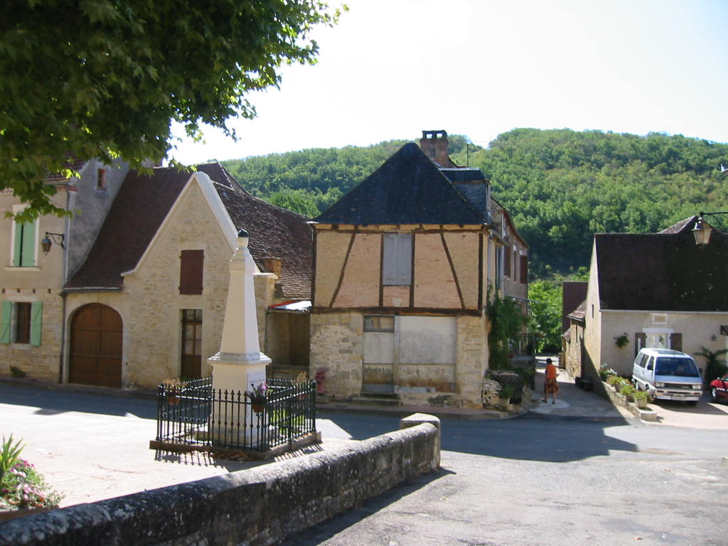 place de l'église , monument aux morts et maison à colombages